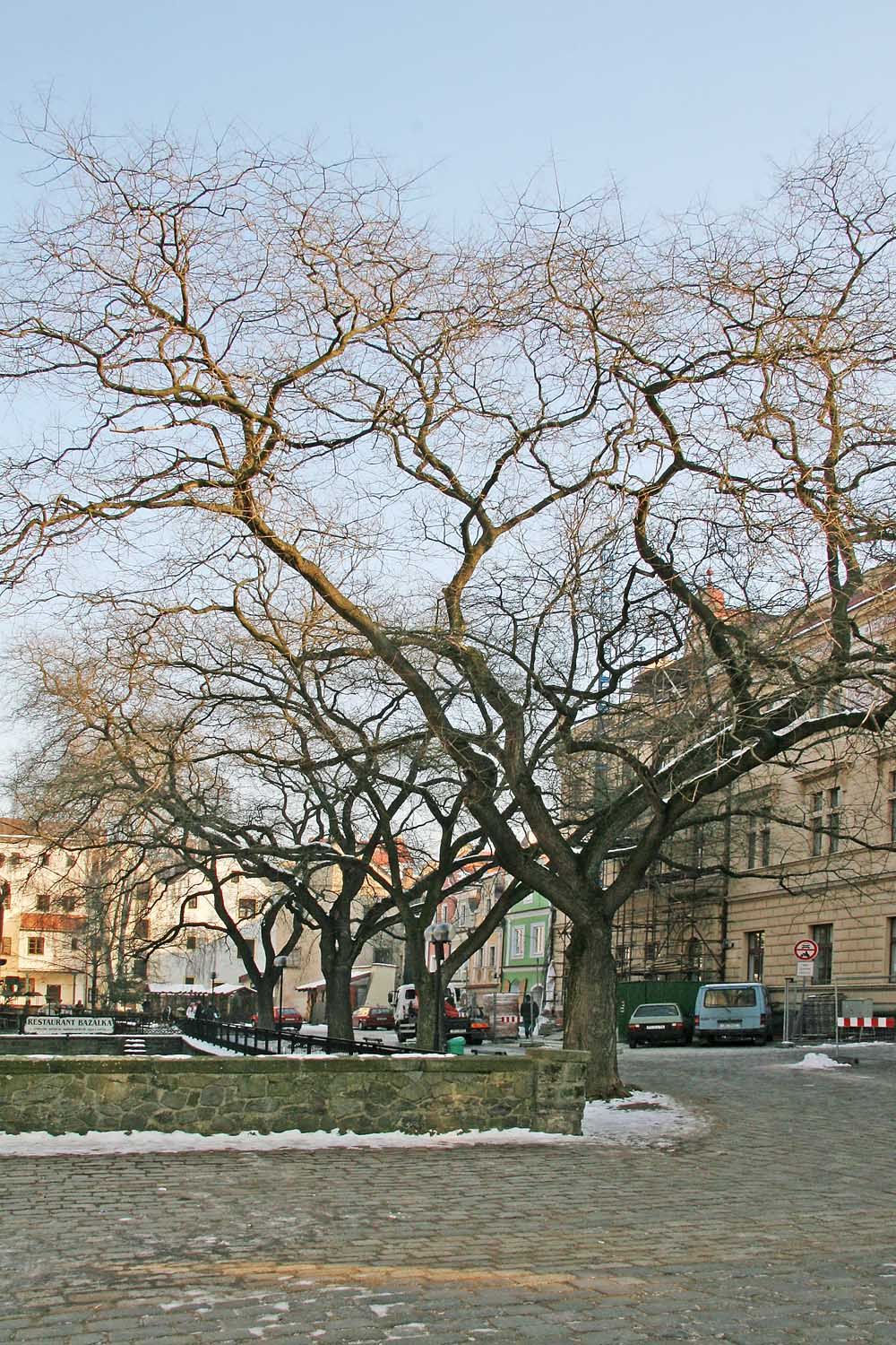 skupina čtyř památných jerlínů japonských na Wernerově nábřeží (Wernerově náměstí) v Pardubicích. Zbytek Strúhy (Císařského náhonu), který existoval již koncem 15. století a vedl z Chrudimky podél dnešní Sukovy ulice do Labe.